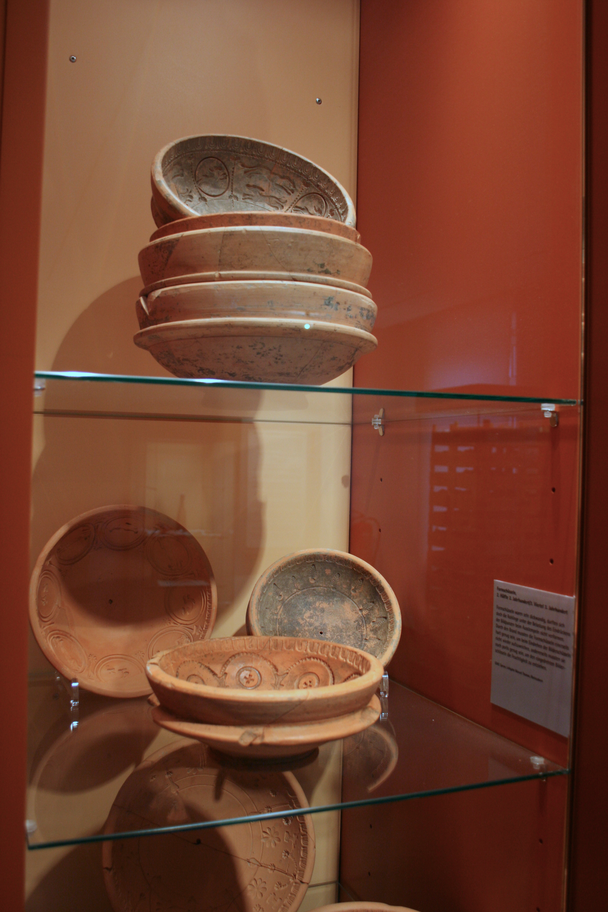 Formschüsseln für Terra sigillata im Museum Rheinzabern. Moulds for Ancient Roman Terra sigillata ware.